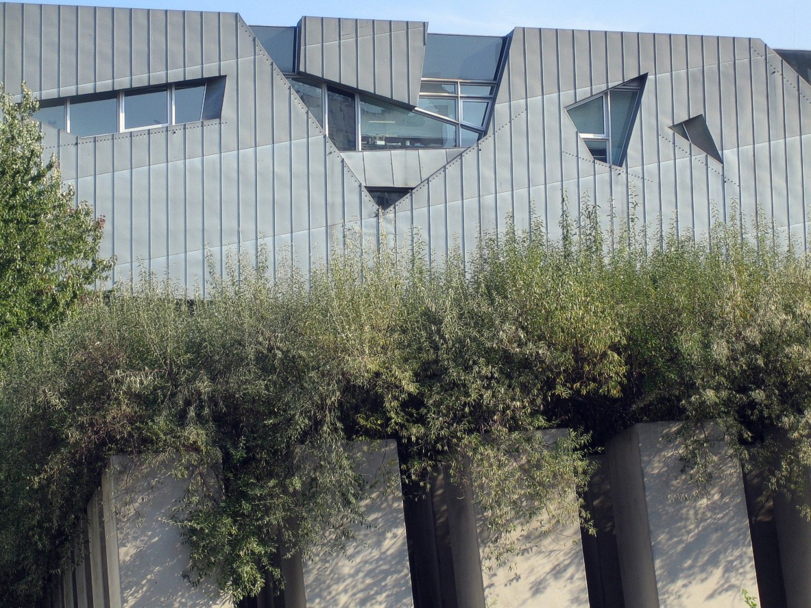 Berlin-Kreuzberg. Jüdisches Museum, Neubau von Daniel Libeskind, Details. Eigenes Foto, 2005. Fotograf: Manfred Brückels.